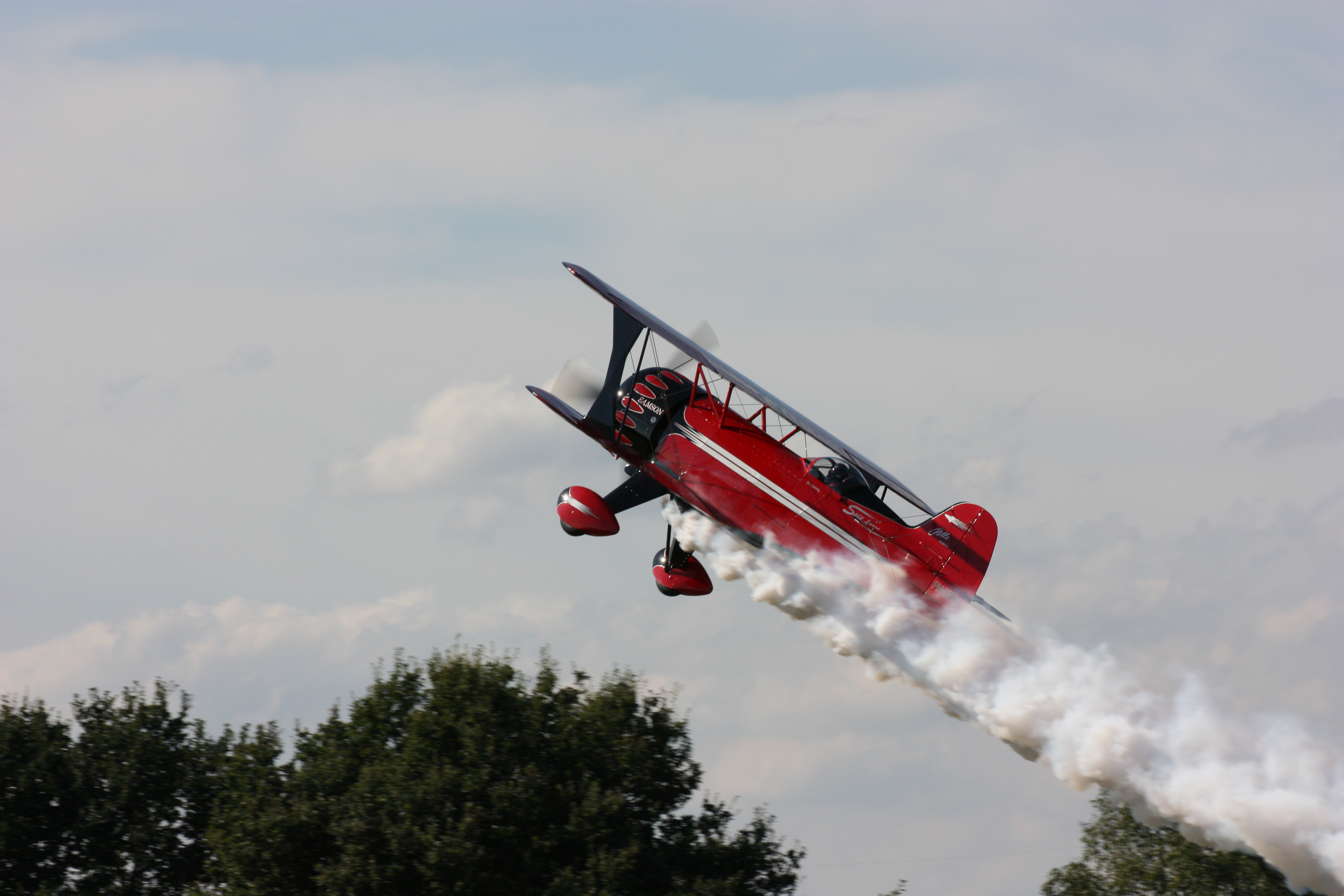 PH-UWE Pitts Samson II FPF Langenfeld